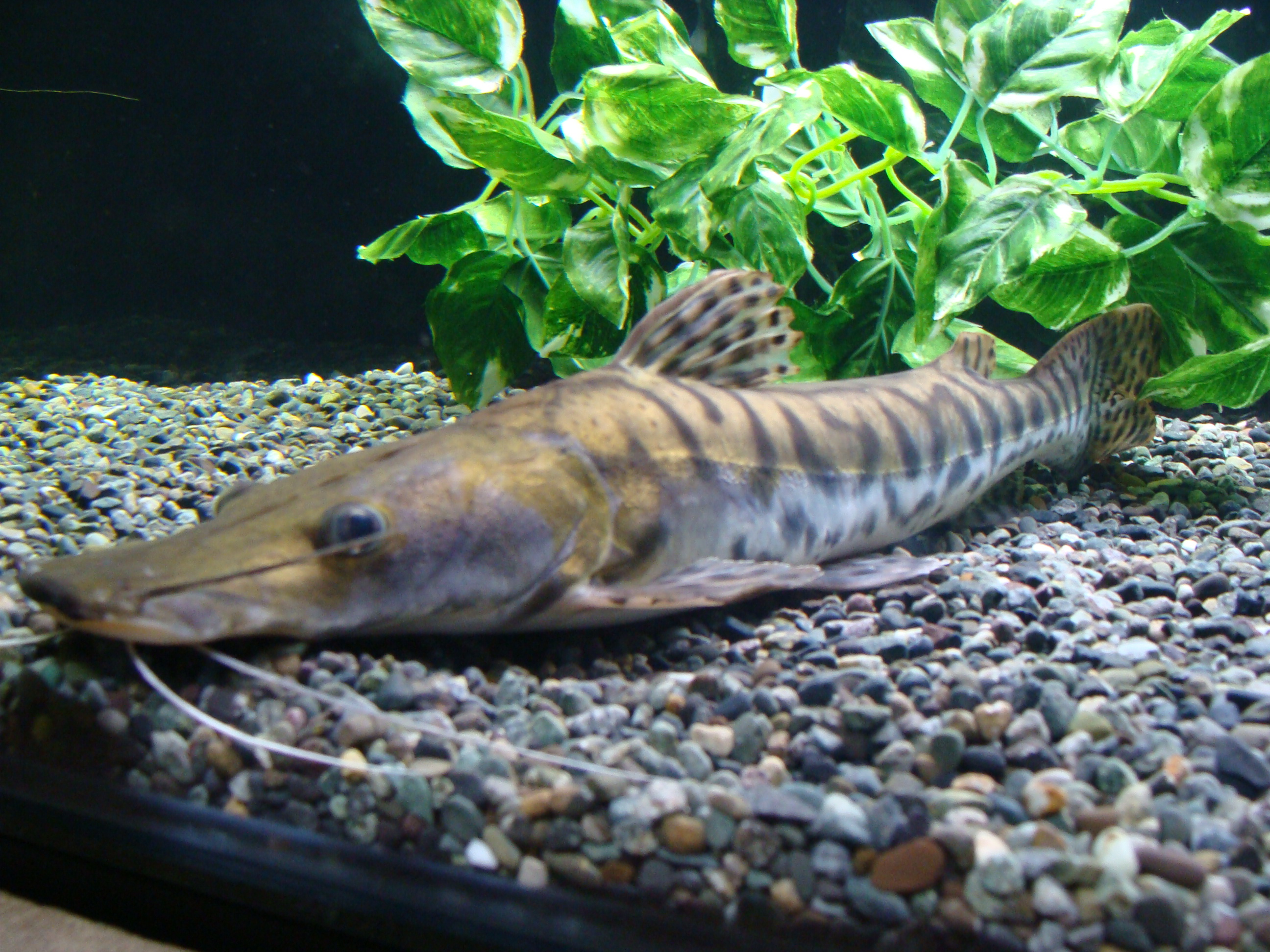 鯰魚002